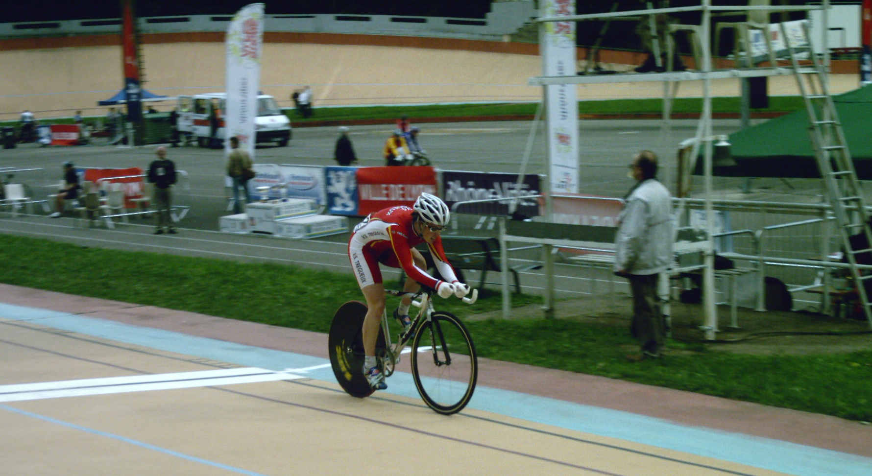 Epreuve féminine du 500m, en cyclisme sur piste. Vélo avec prolongateur au guidon. (vélodrome du Parc de la tête d'Or)